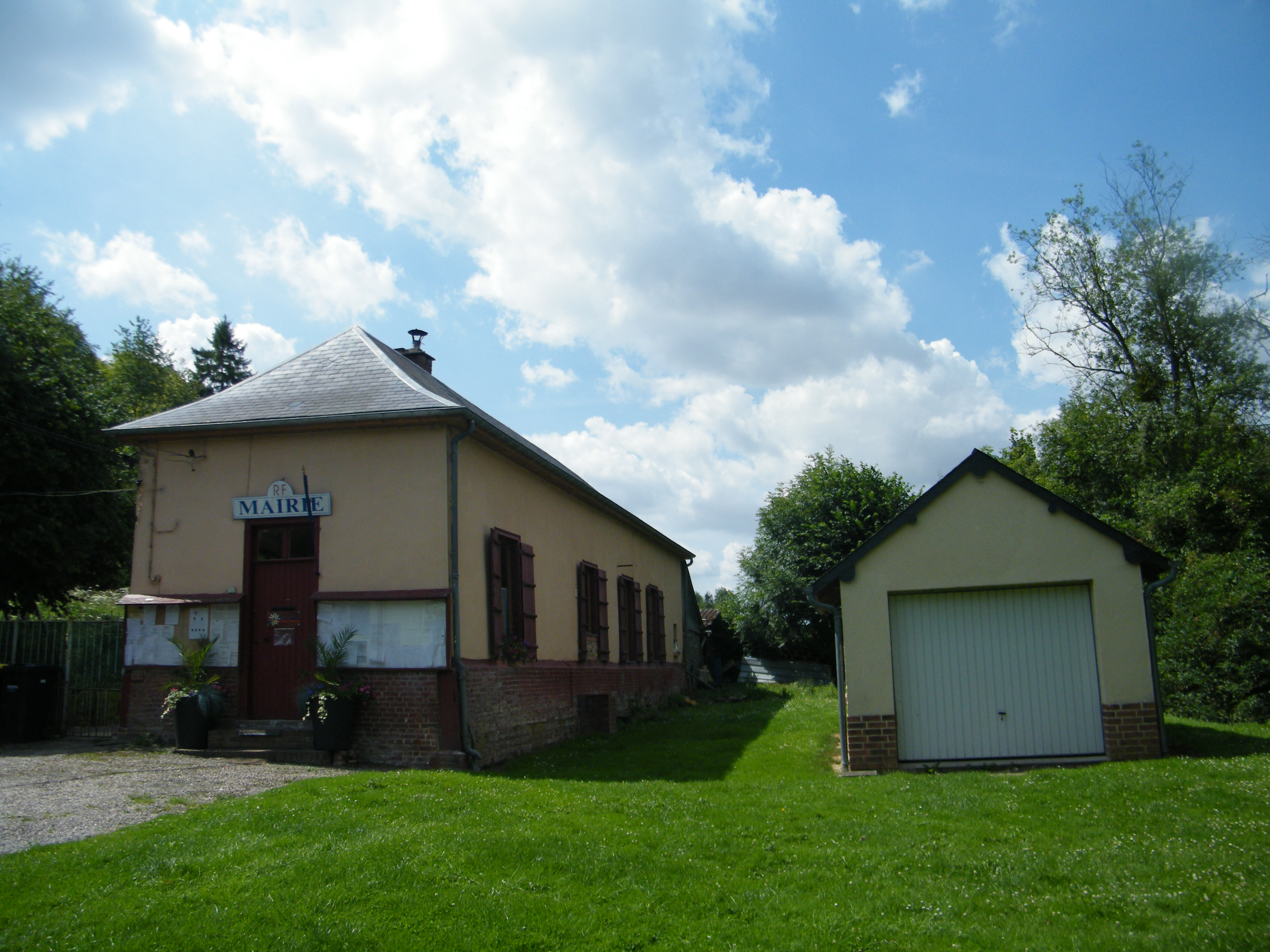 Mairie.